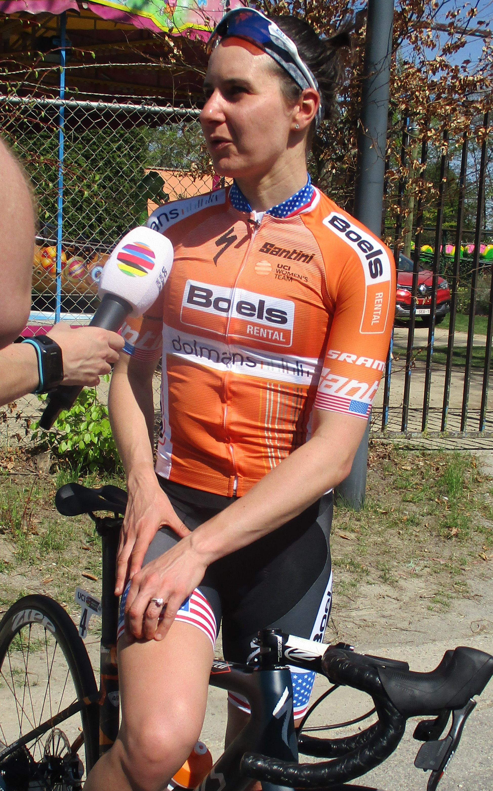 Na de finish van de Waalse Pijl 2018 op de Mur van Huy.